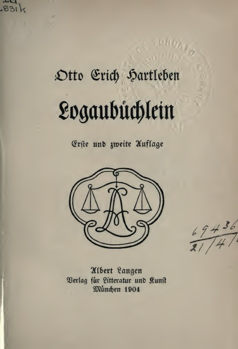 Frontespizio